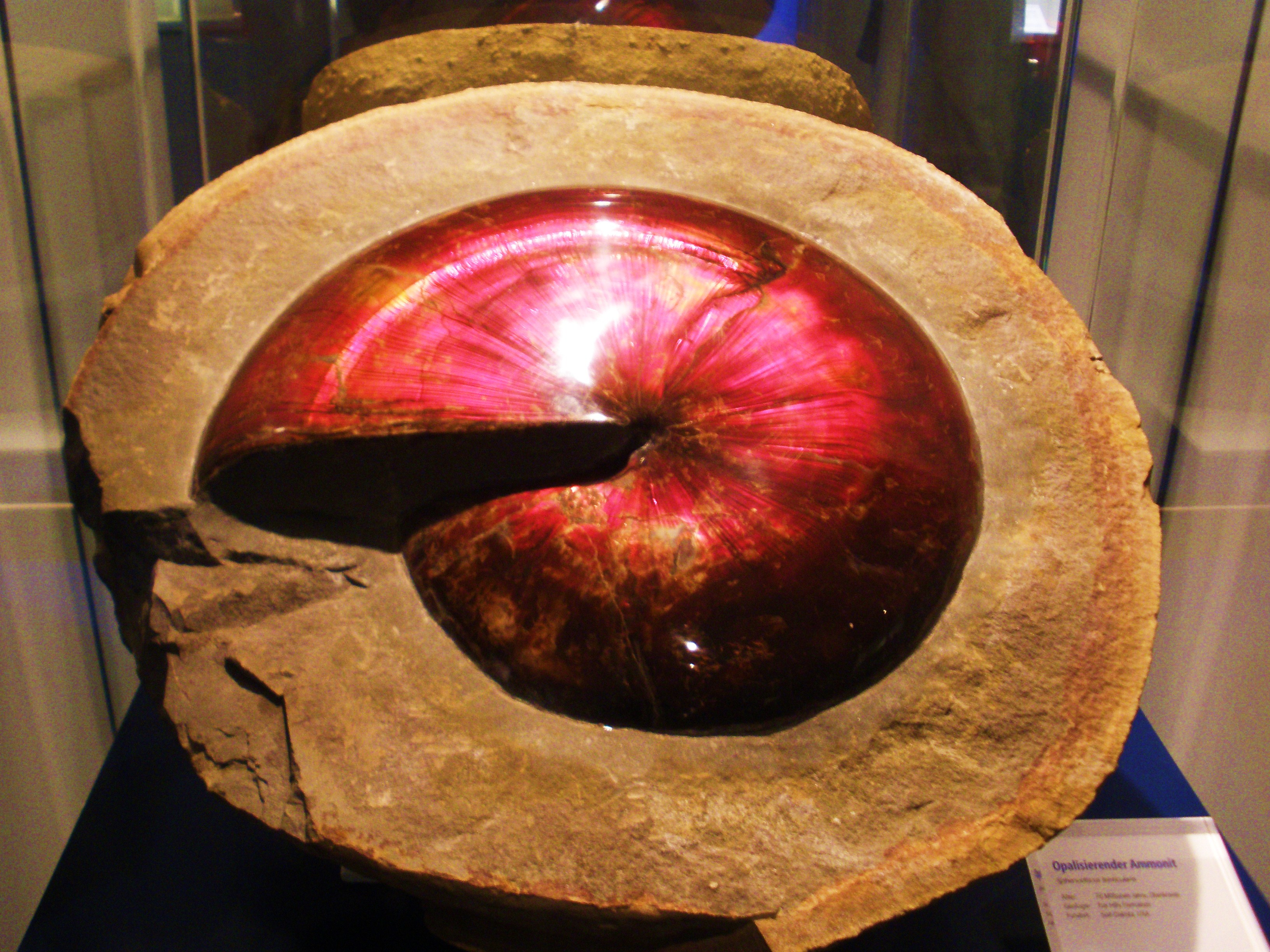 Fossil Sphenodiscus species